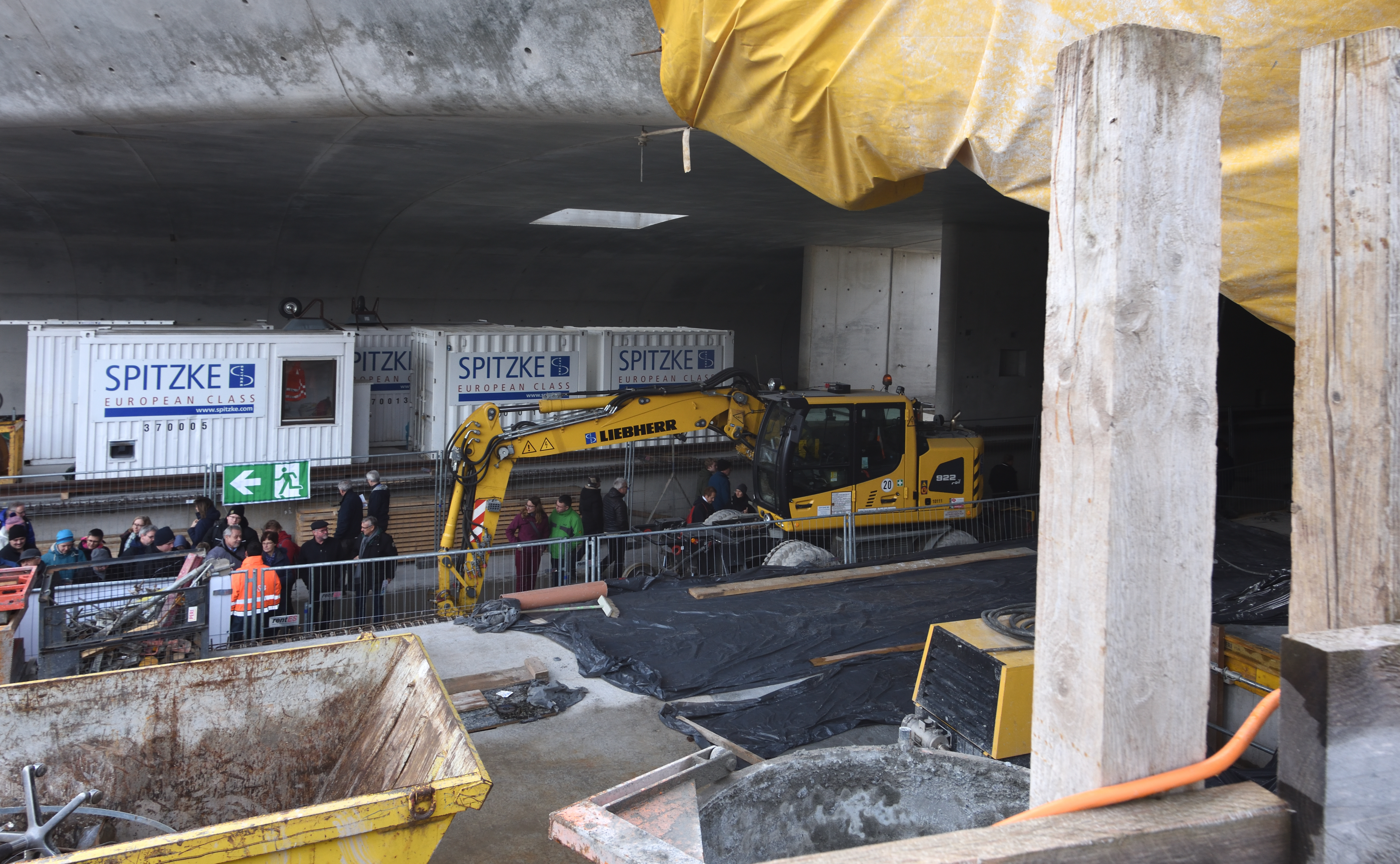 Stuttgart 21, Baustelle im Januar 2020, künftige U-Bahn-Haltestelle Staatsgalerie